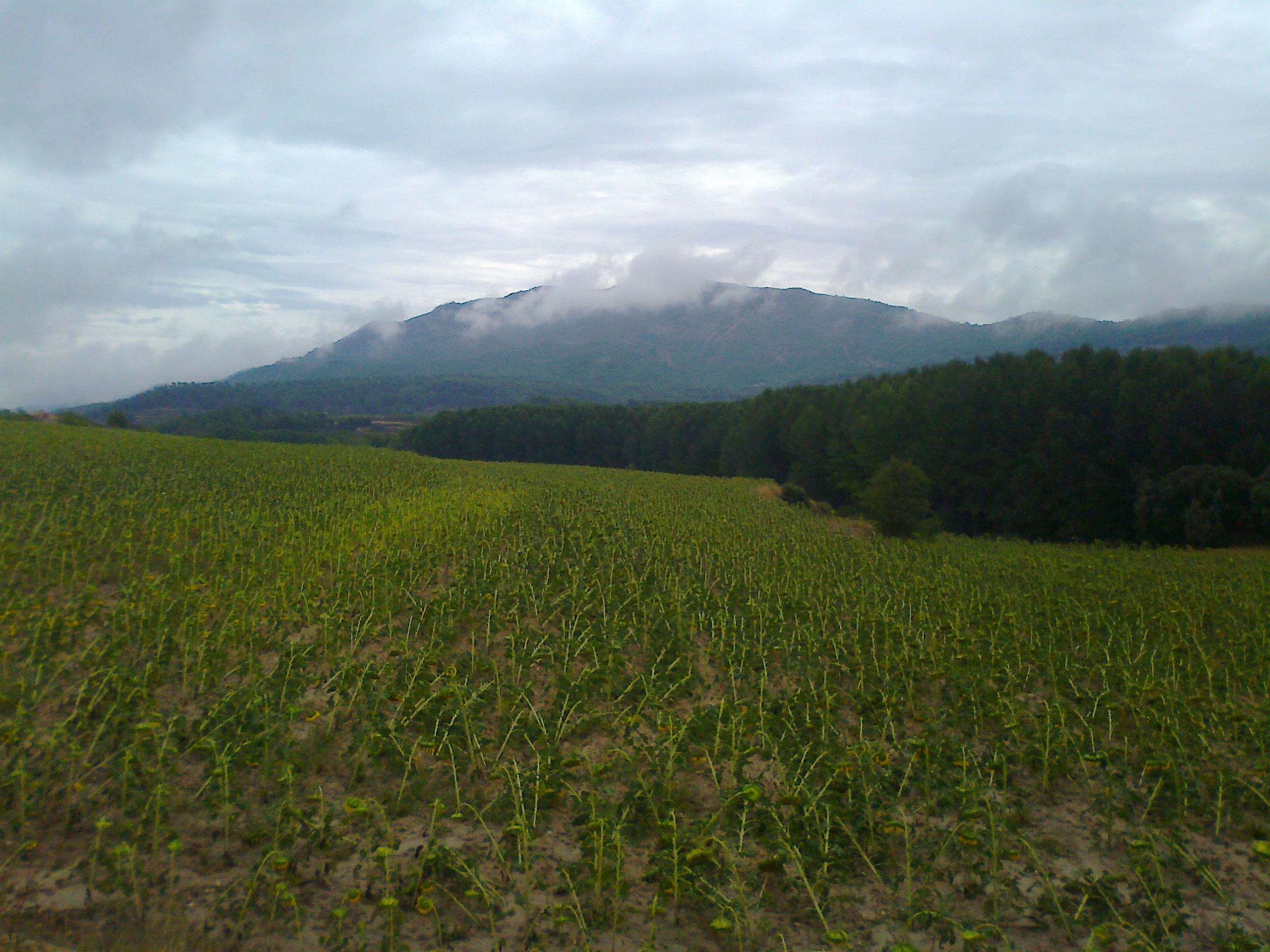 Panoràmica del Vall de Polop, Alcoy (Alacant).